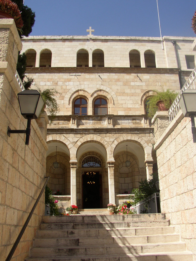 Österreichisches Hospiz - Austrian hospice in East Jerusalem